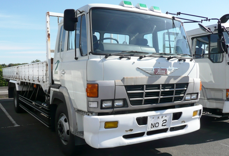 全国白バイ安全運転競技大会にて撮影。